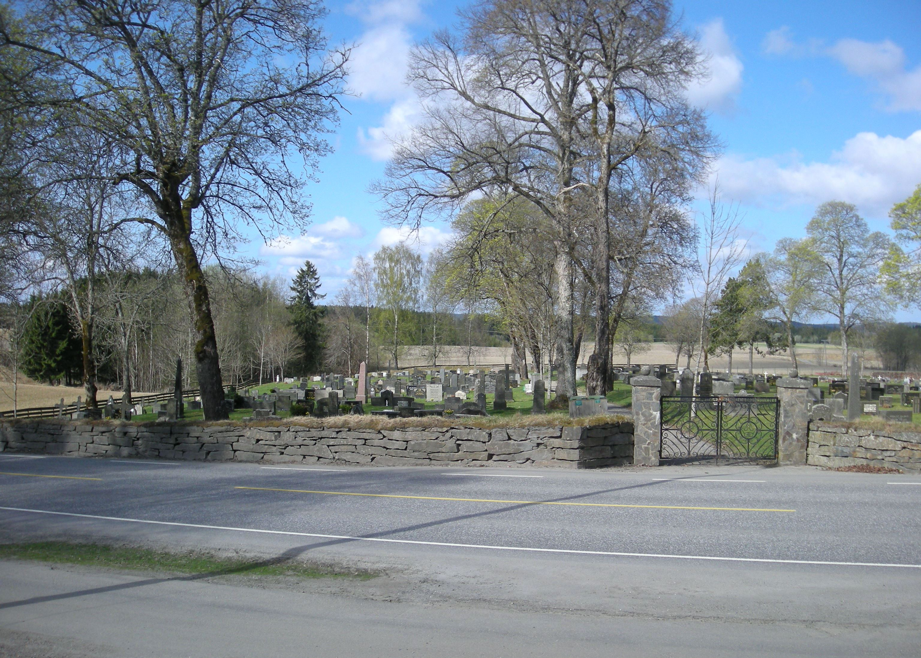 Riksvei 22 går forbi Båstad kirke (Trøgstad kommune i Østfold).